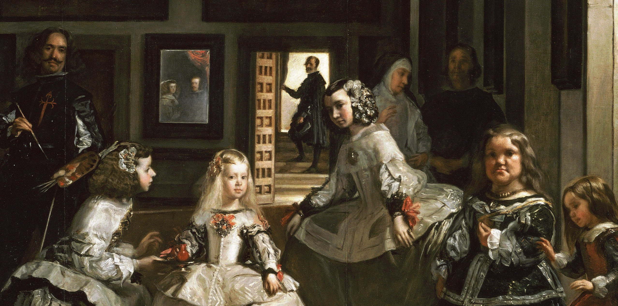 Las Meninas o La familia de Felipe IV (detalle), óleo sobre lienzo, 310 cm × 276 cm, Museo del Prado, Madrid